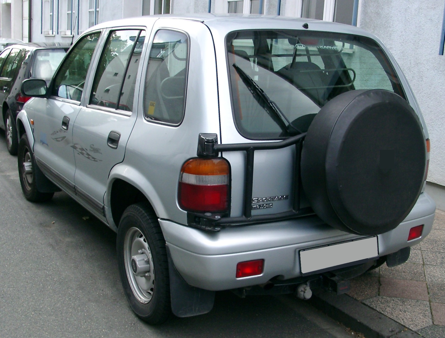 Kia Sportage, 1. Generation